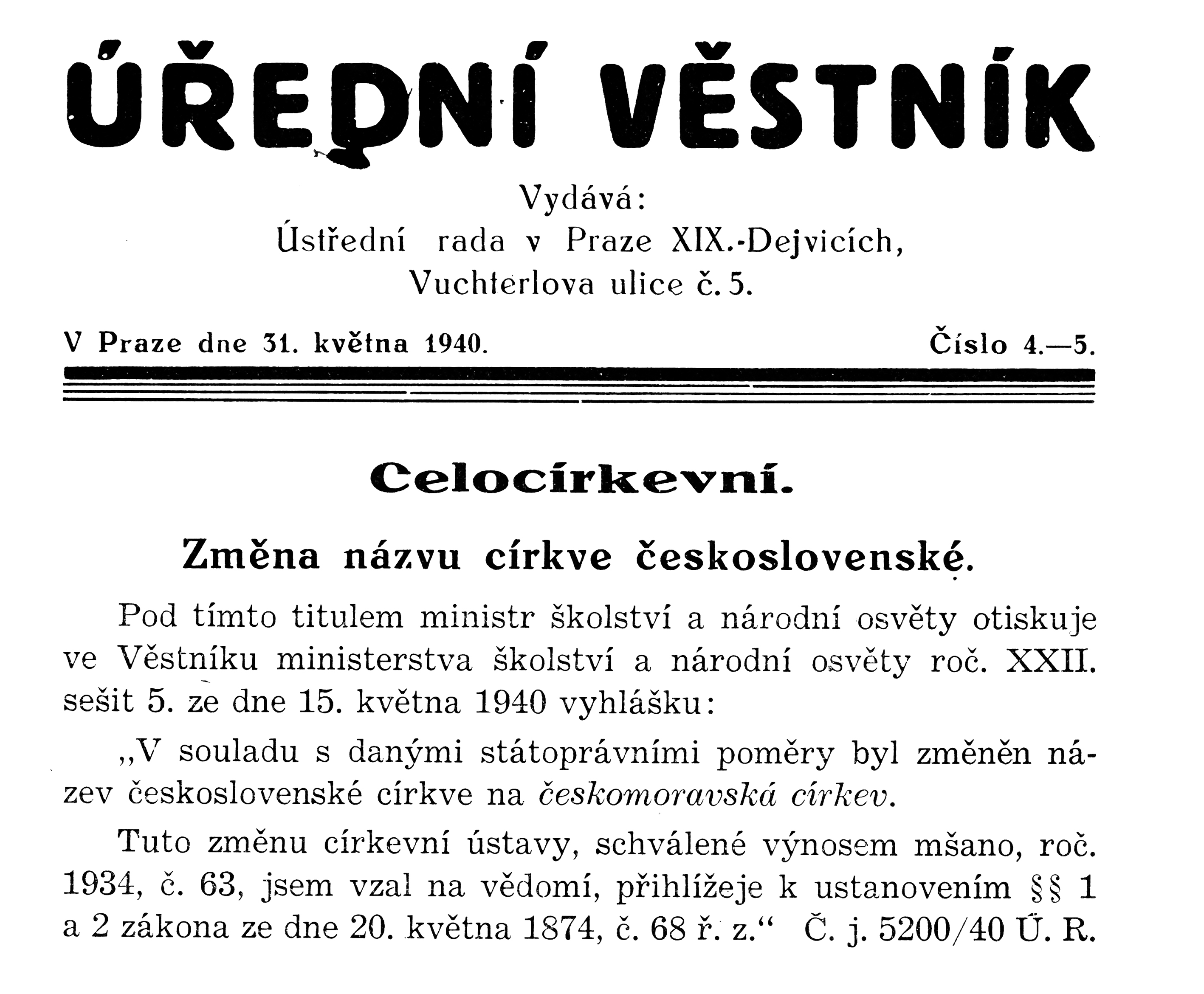 Úřední věstník církve